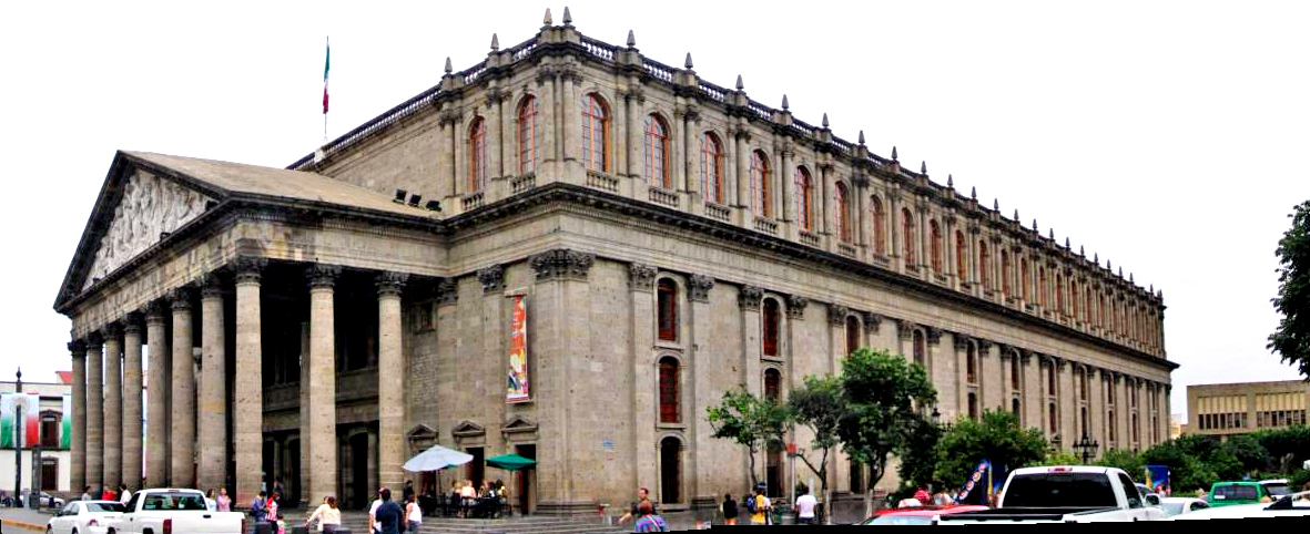 Una panorámica del Teatro Degollado a inicios de Octubre del 2006